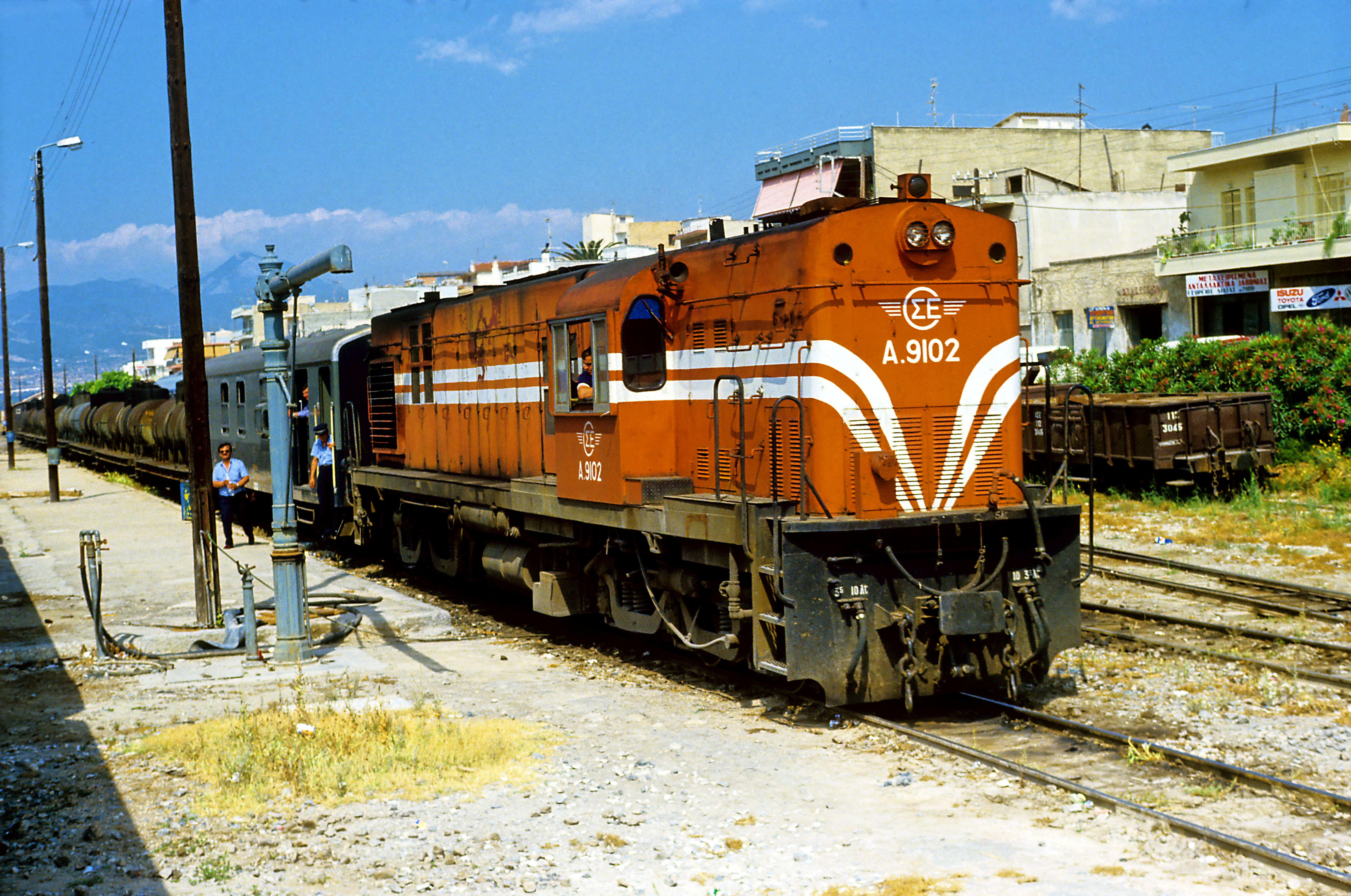 Kesselwagenzug Richtung Tripoli. Der Gepäckwagen ist Dienstraum für den Zugführer, unbegleitet fuhren die OSE-Güterzüge zumindest auf Meterspur nicht.